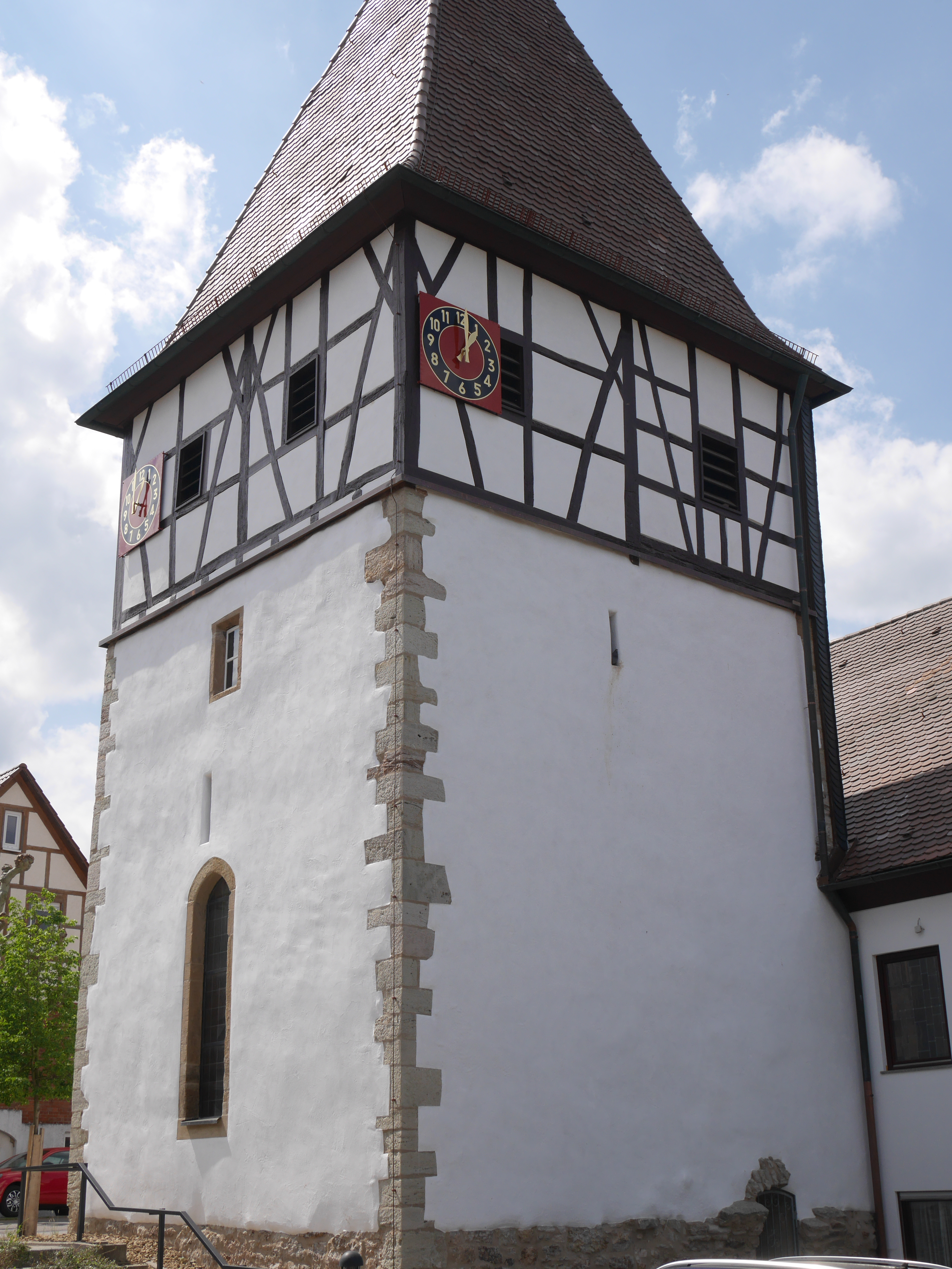 Marienkirche (Eibensbach) Turm